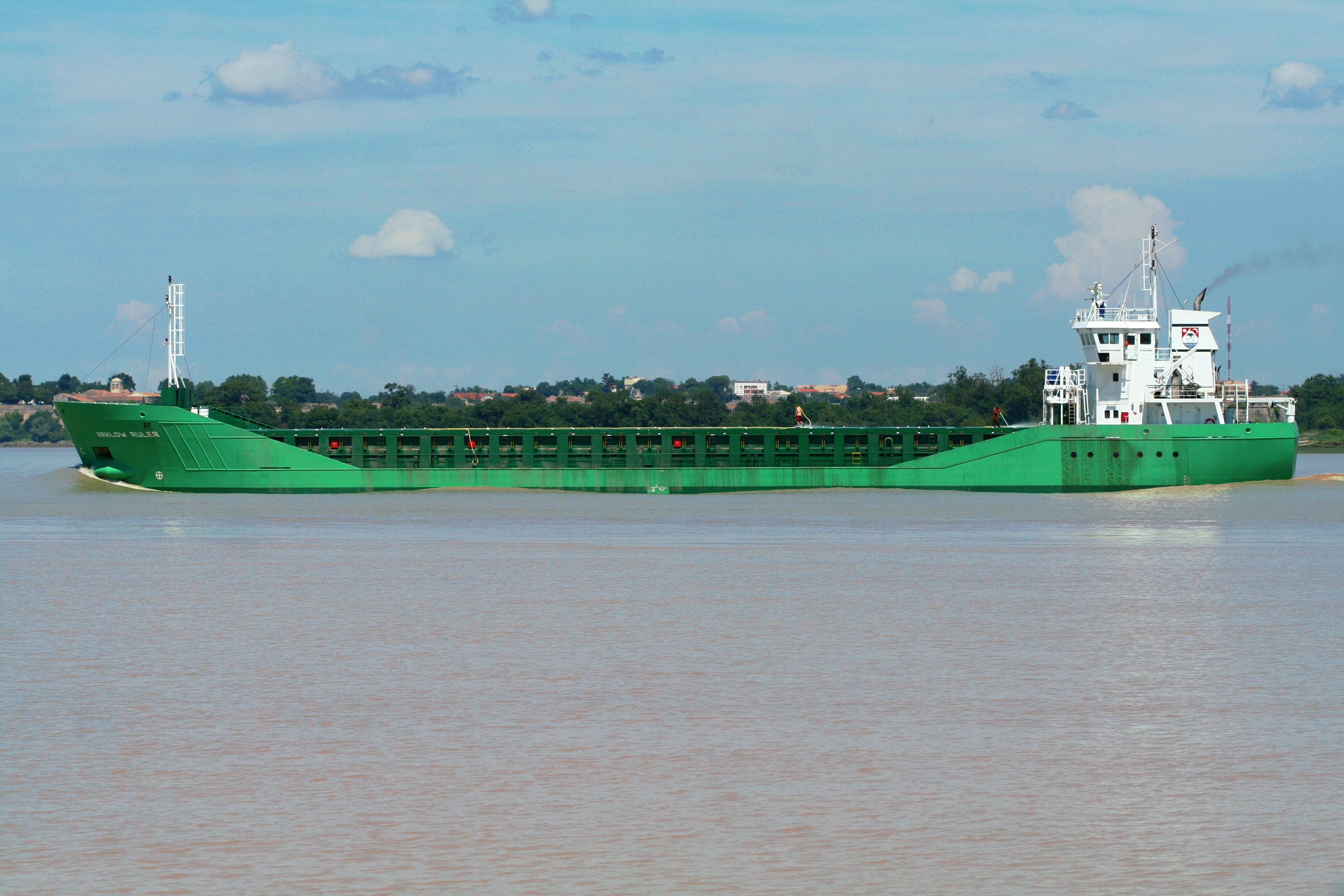 Arklow Ruler (IMO 9344502) dans l'estuaire de la Gironde.